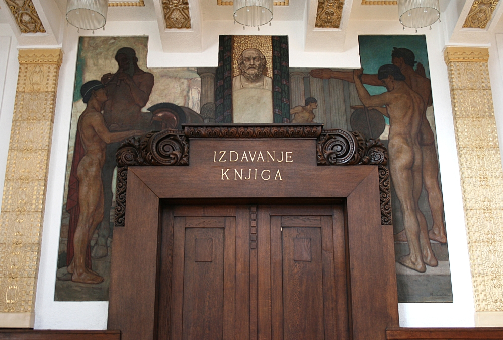 "Nastava starog vijeka" (prikazani su na lijevoj strani kentaur Chiron kako podučava Achila svirati dvojnicu, a na desnoj strani dva bacača diska, kompoziciju u sredini povezuje bista Homera), jedno od tri slike, ulja na platnu, Mirka Račkog u velikoj čitaonici Hrvatskog državnog arhiva.